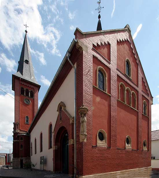 St-Andreas--aus-Klein-Winternheim--Weitwinkel--2007